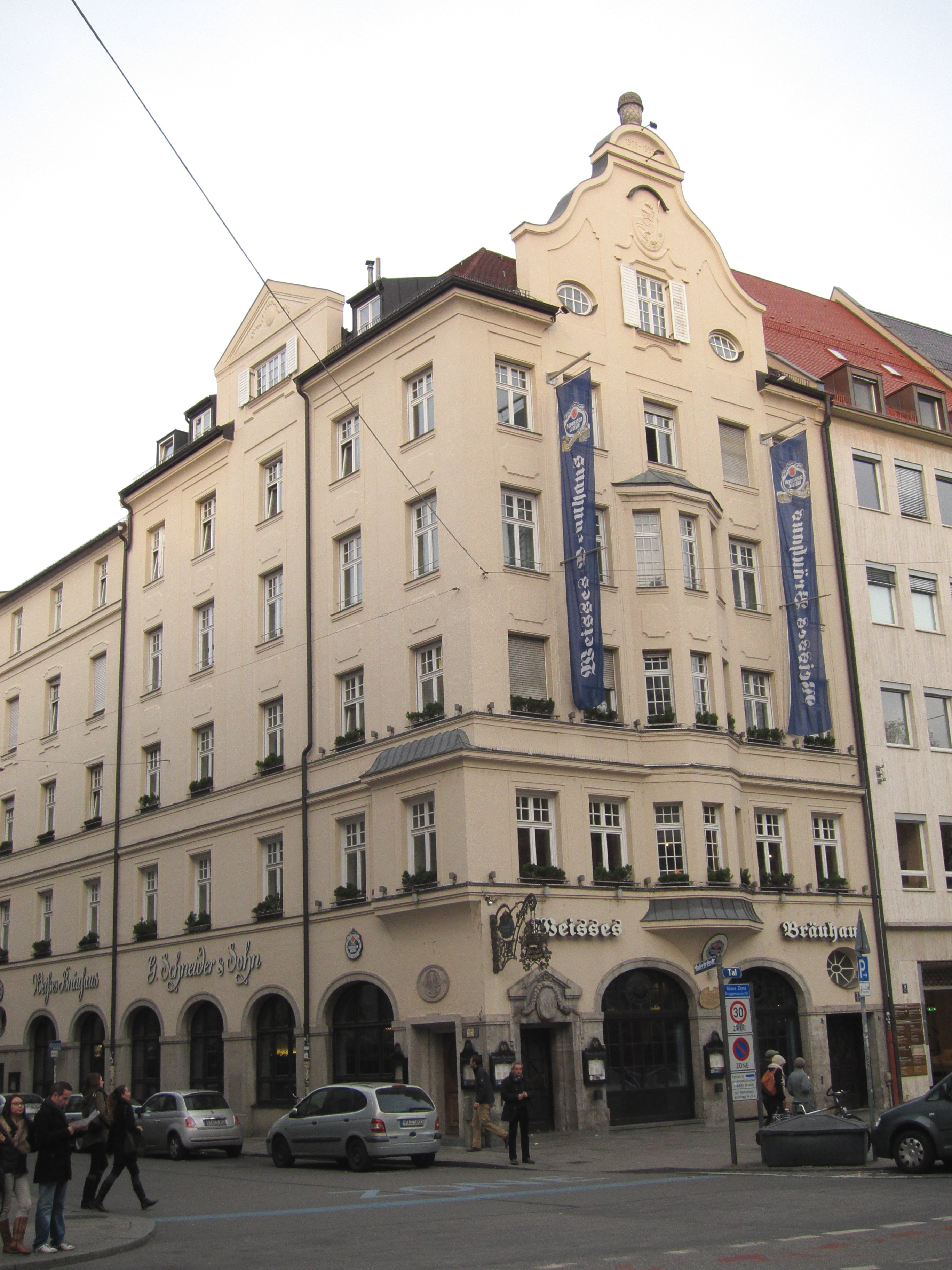 Tal 7; Eckhaus "Weißes Bräuhaus", in schlicht barockisierenden Formen, 1903 von Heilmann & Littmann; ehemals mit Giebel; Block mit Maderbräustraße 2.